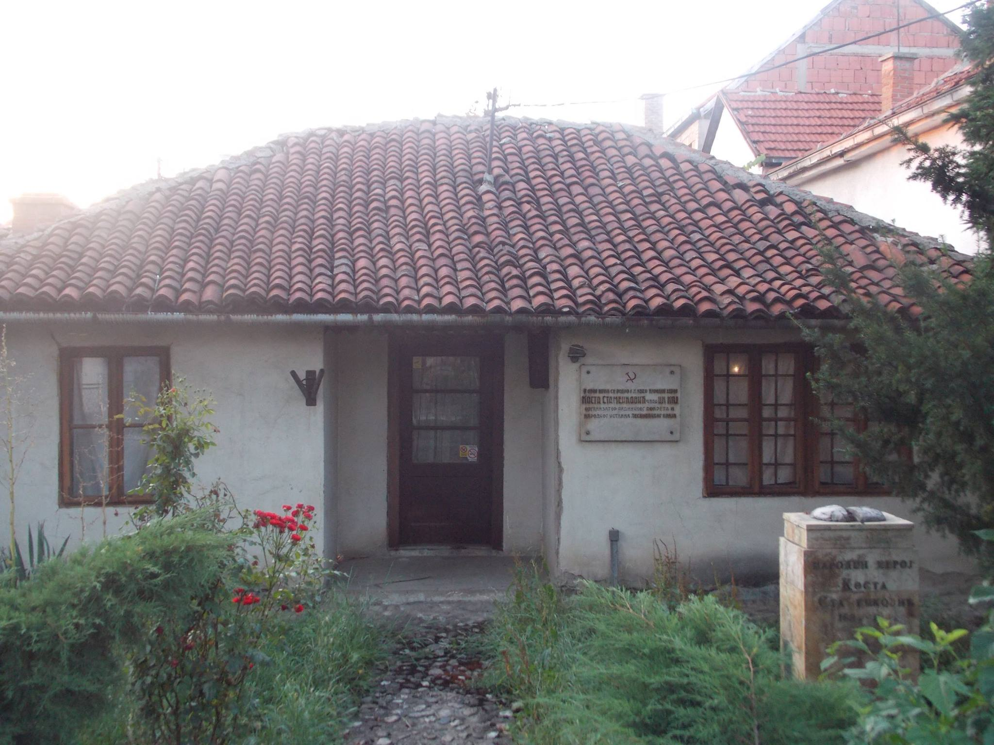 Српски (ћирилица): Кућа Косте Стаменковића